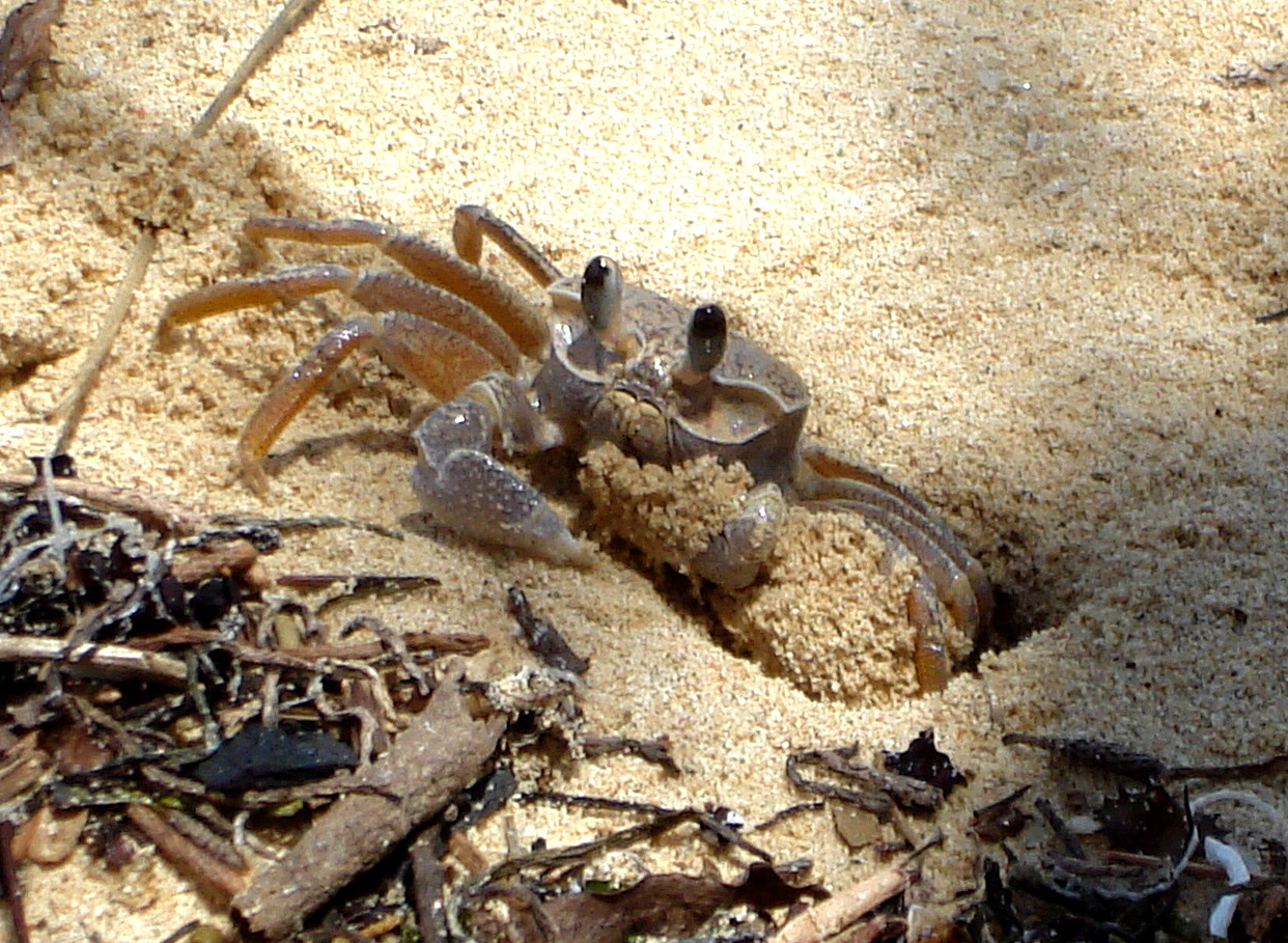 Ghost crab (Ocypode madagascariensis)